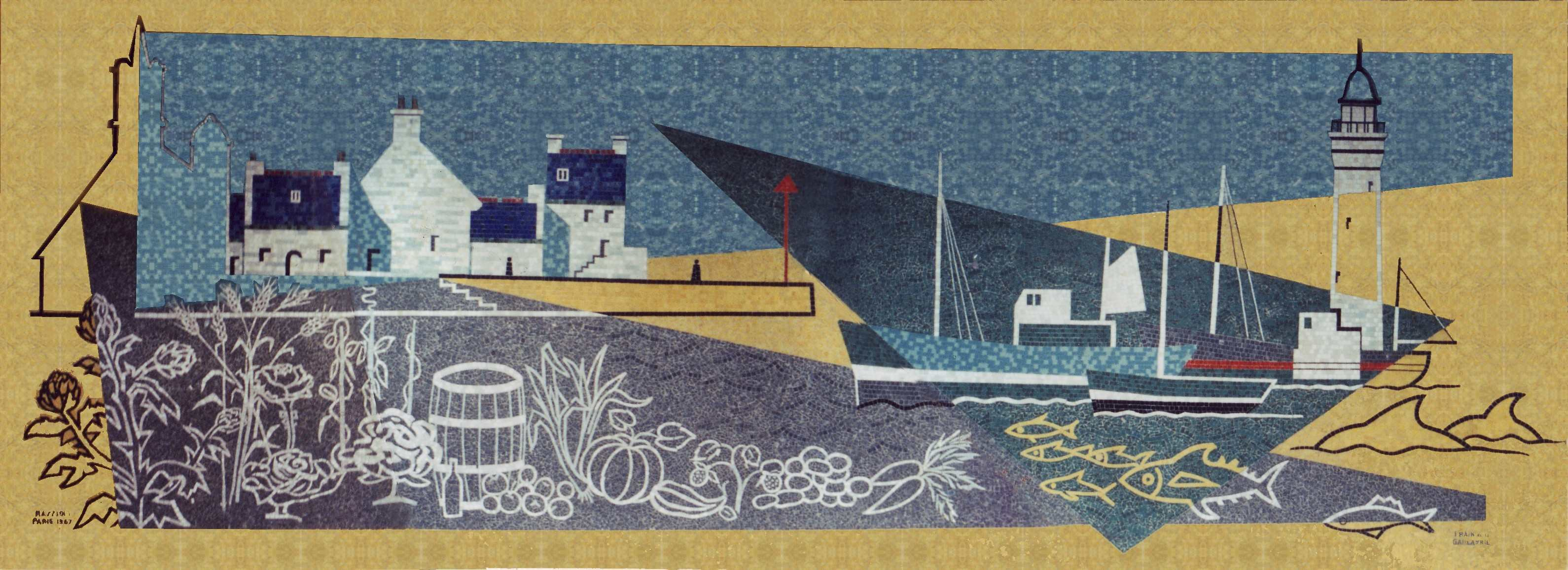 Mosaïque pour la décoration de la grande salle du foyer du Lycée Agricole de Bréhoulou (Fouesnant 29 sud) dans le cadre du « 1% ».